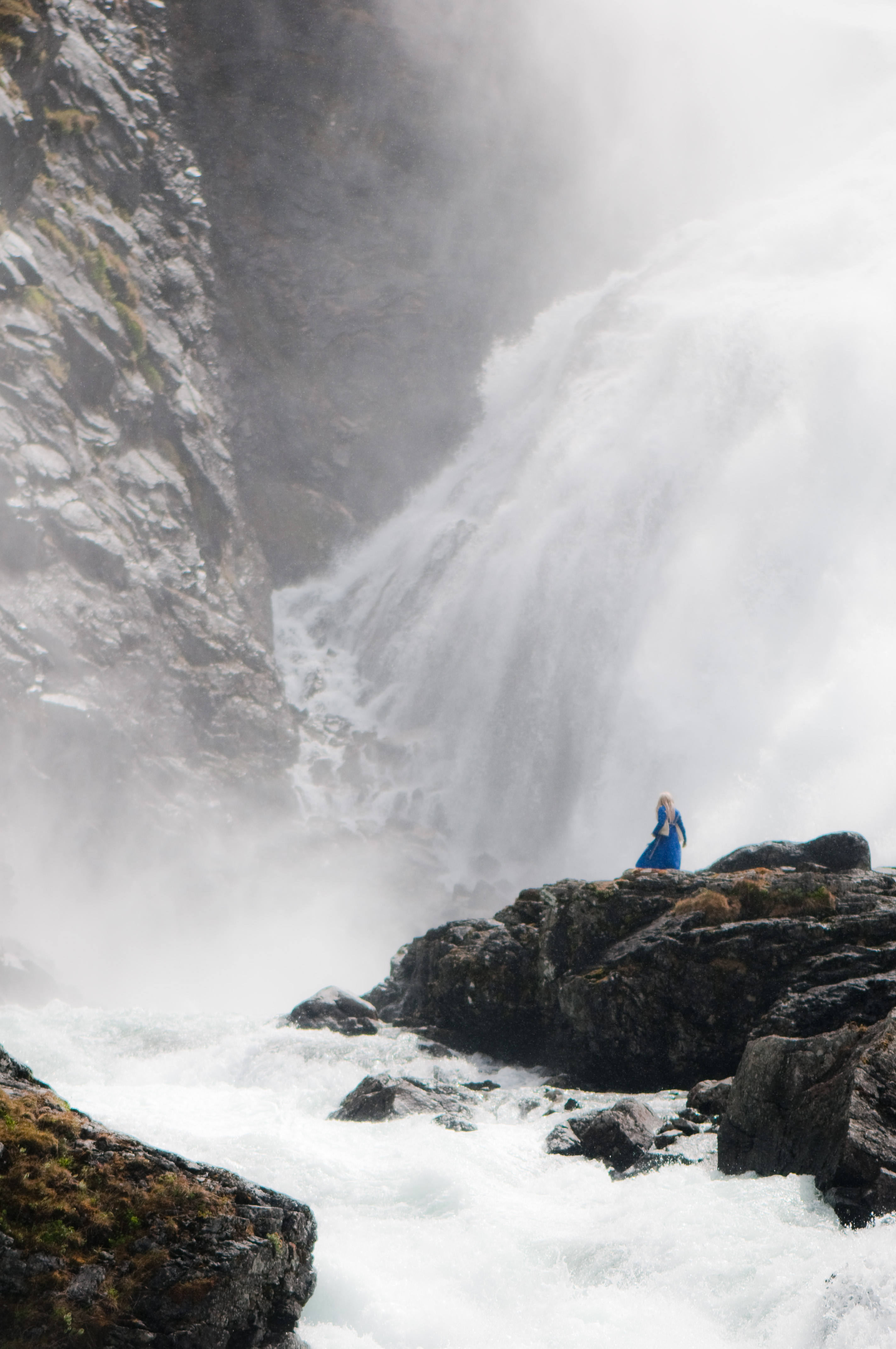 Kjosfossen med huldreshow for turistar